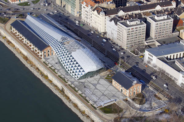 Bálna a magasból